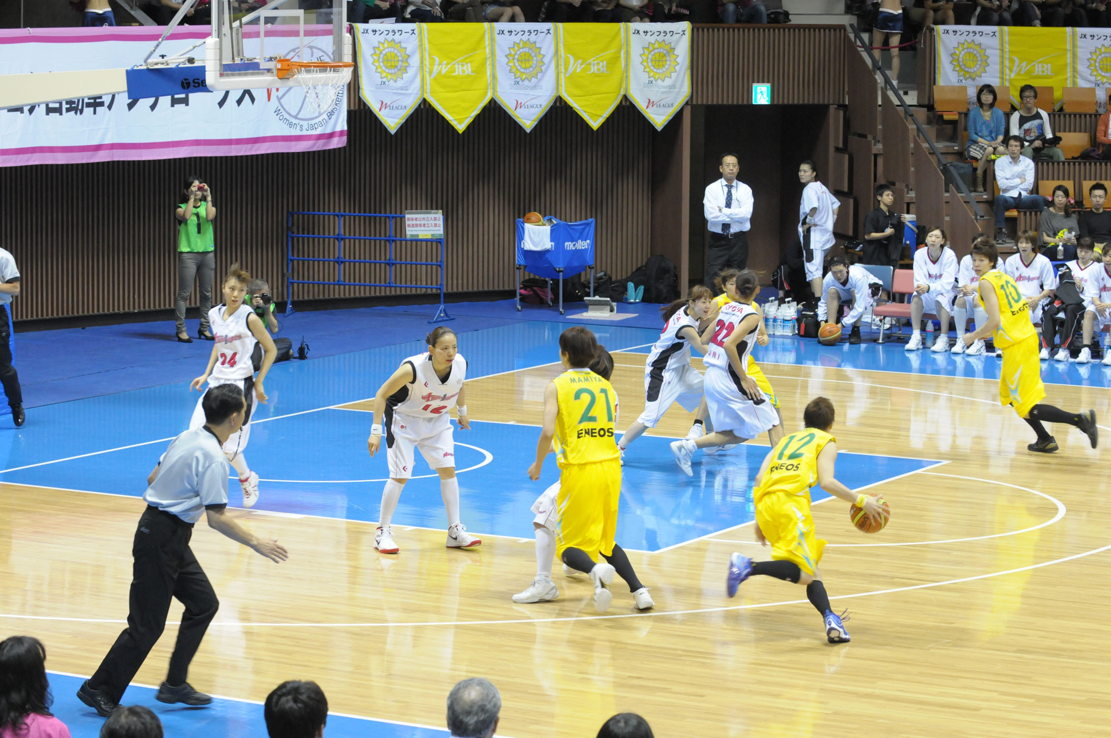 WJBL 12-13レギュラーリーグ、トヨタ対JX。代々木第二体育館。